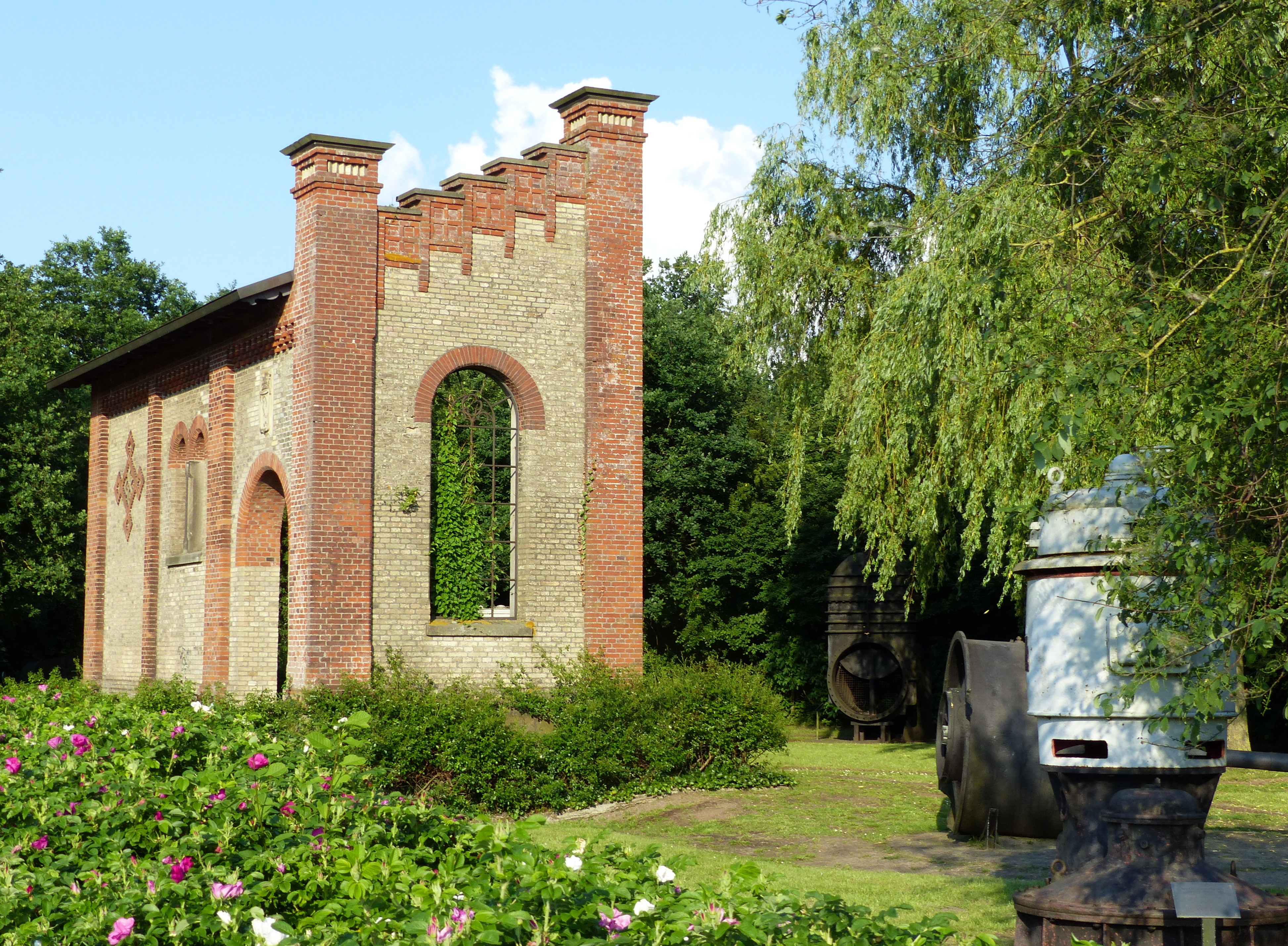 Schöpfwerk Wasserhorst, Freilichtmuseum